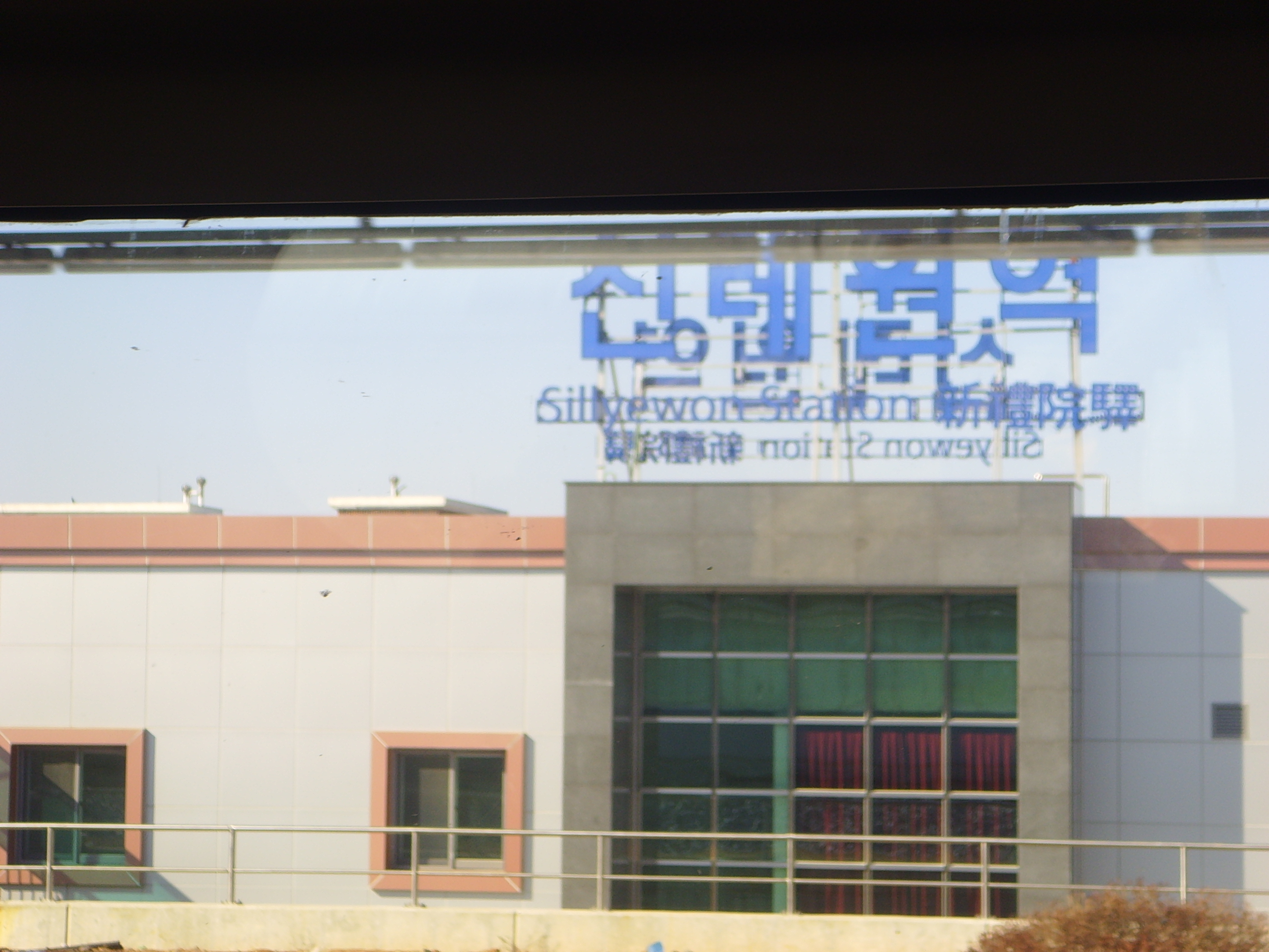 장항선 신례원역